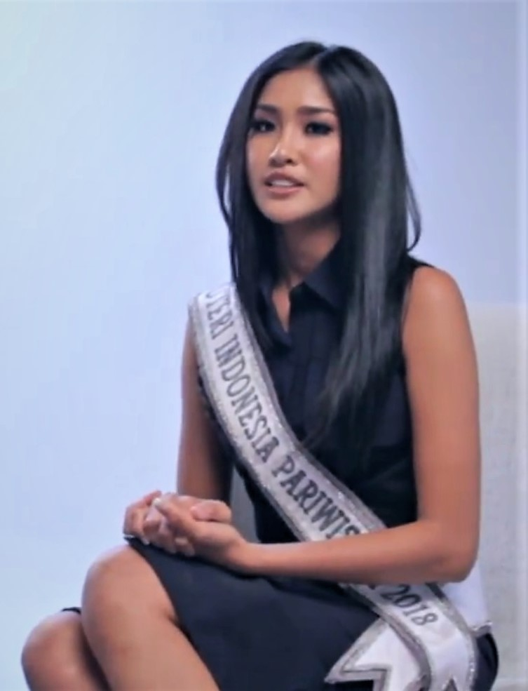 Empati Putri Indonesia Pariwisata 2018 untuk Lombok 2